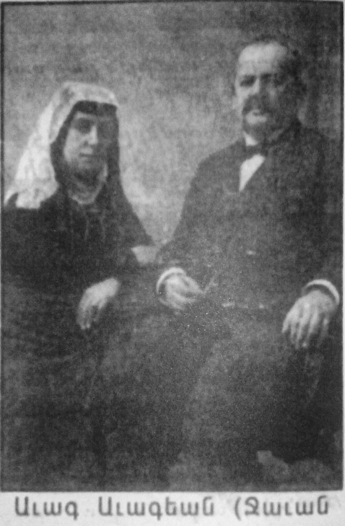 آواک آواکیان، معروف به جوآن آواکیان. محله ارمنی‌نشین بارناوا در تبریز، به نام او است.